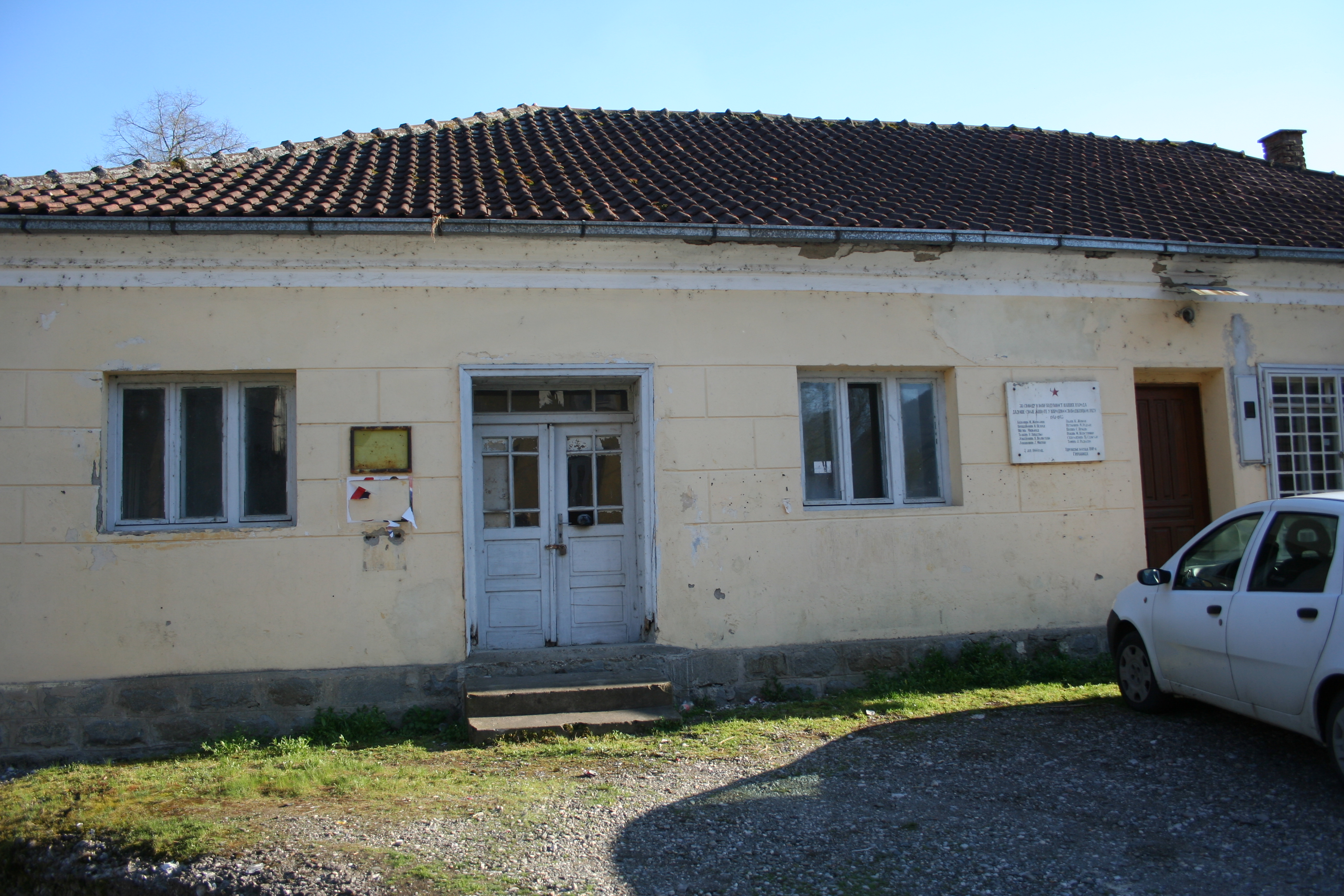 Centar sela, Gračanica